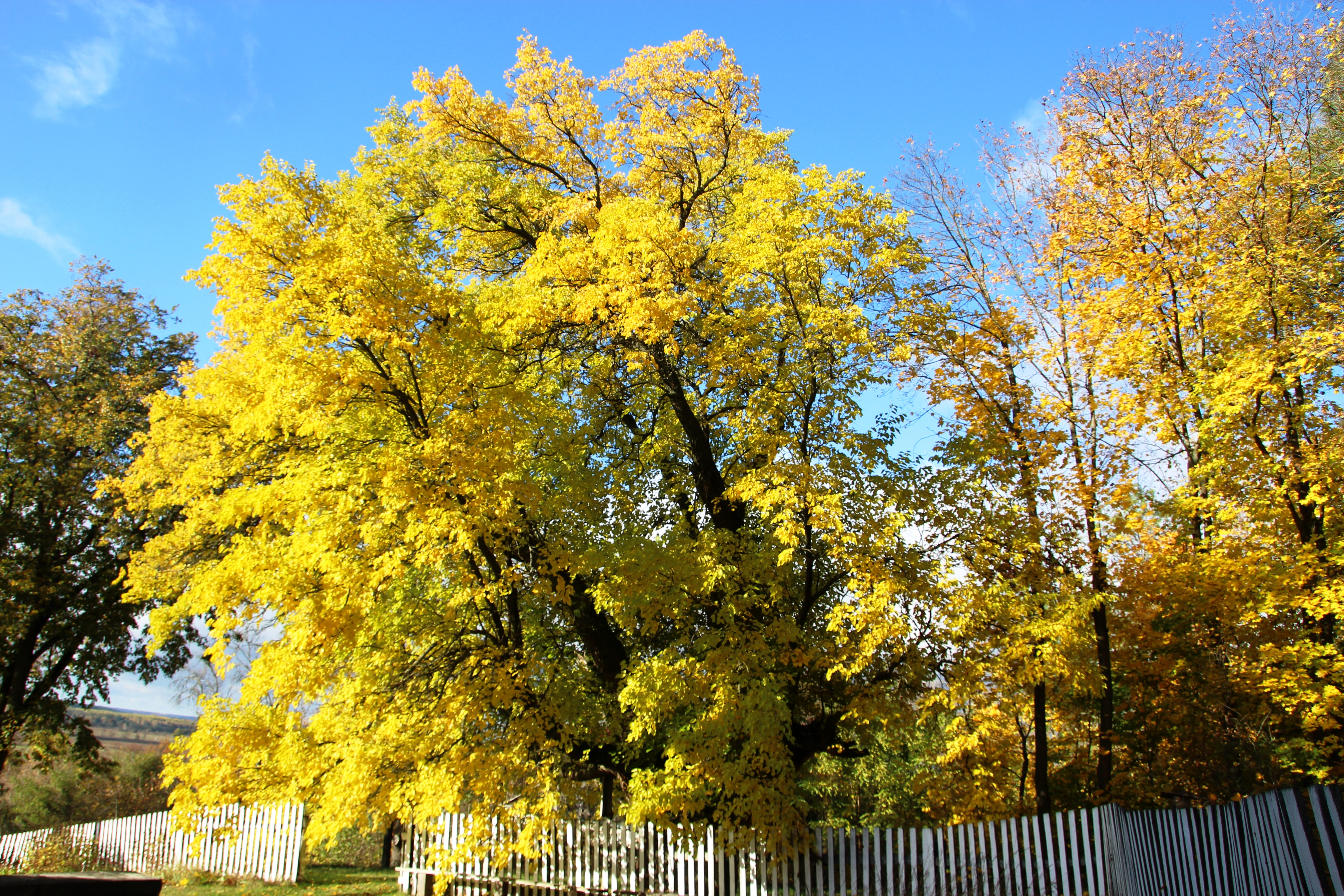 Стара Шовковиця в селі Межиріч Лебединський район